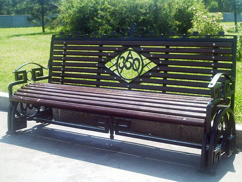 «Юбилейная скамейка» в Иркутске